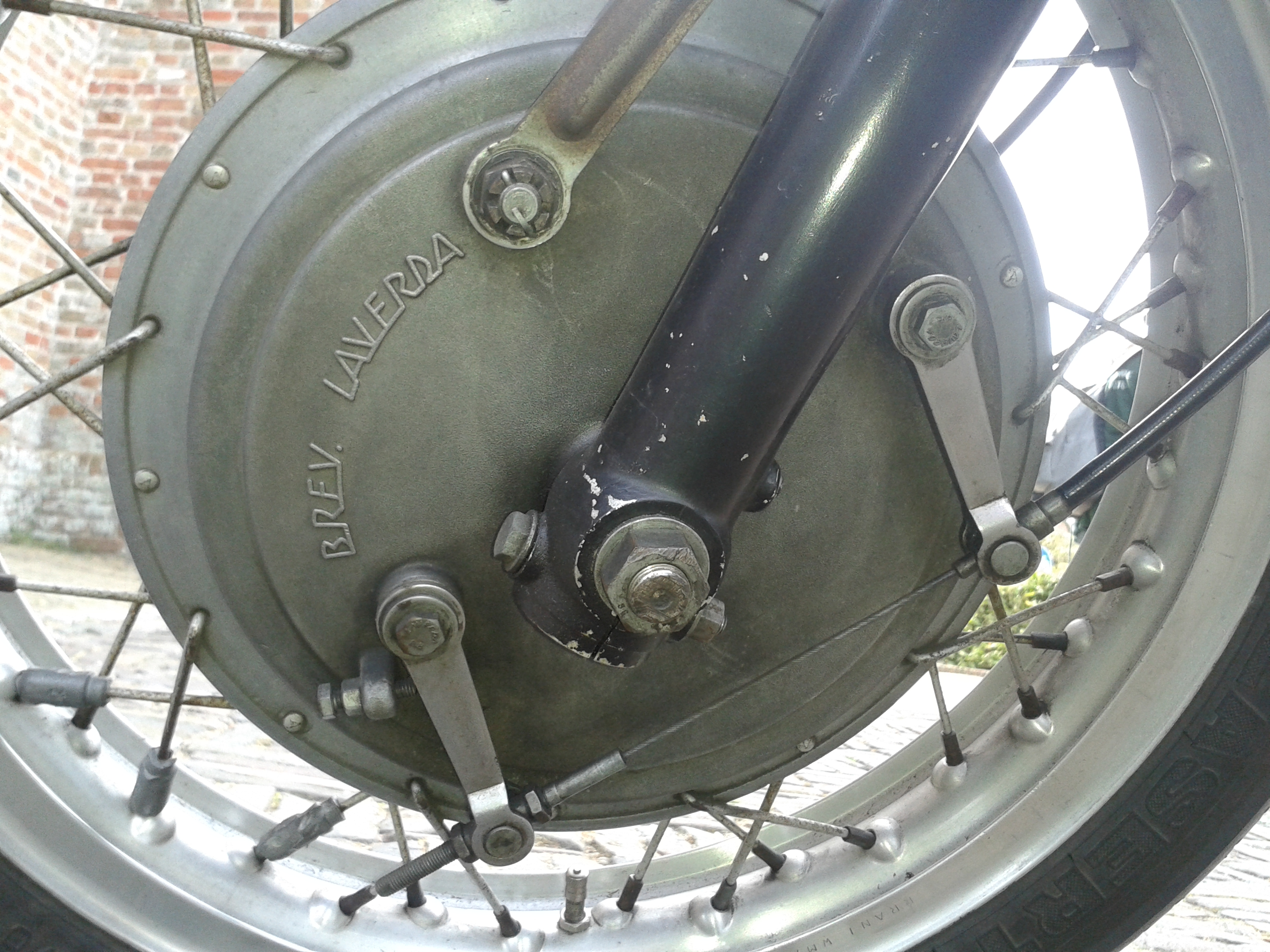 Laverda Trommelbremse an Laverda 750 SF (Bj. 1971/1972); 230 mm Durchmesser. Mit Pleuel statt Bremsnocken, dadurch leichter Blockierverhinderereffekt